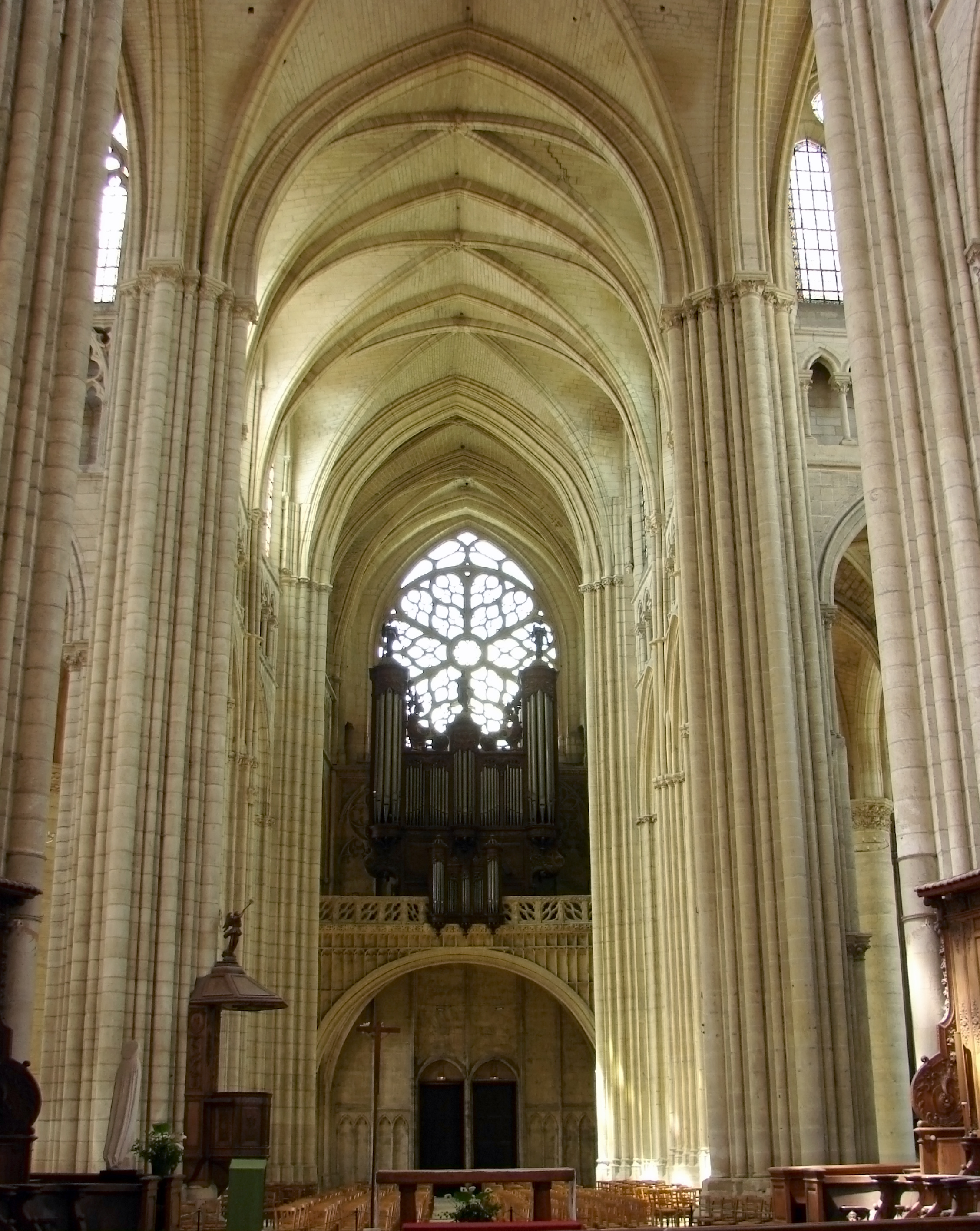 La nef et le revers de la façade de la cathédrale Saint-Etienne de Meaux.